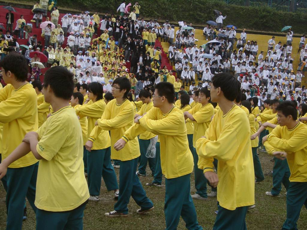 臺北市立永春高中永春拳表演。